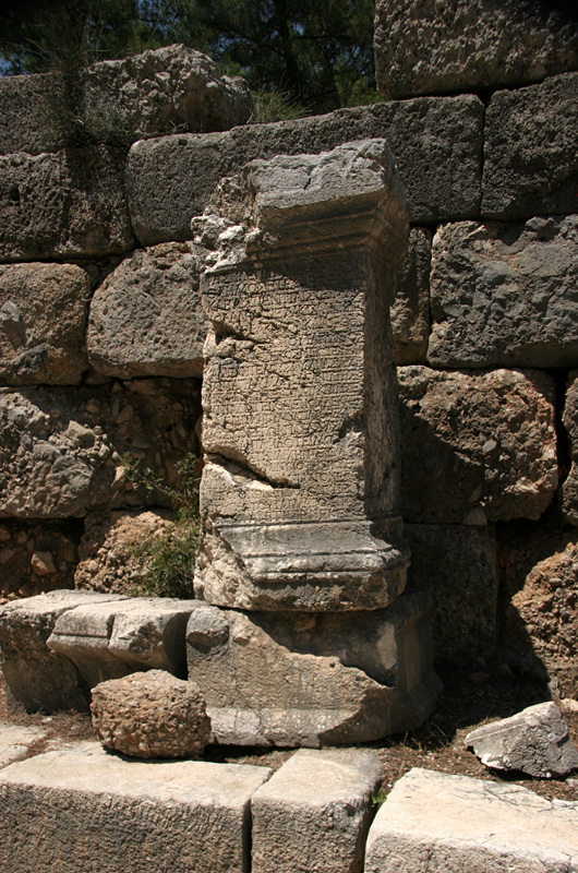 Säule mit Inschrift in Phaselis